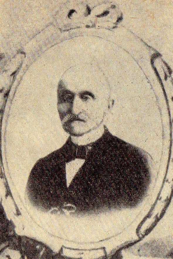 Karol Wedel - cukiernik.